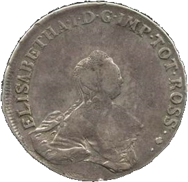 Ливонез. Монета для Прибалтийских провинций России Лифляндии и Эстляндии. 96 Копеек 1757 г. Серебро, 26,67 гр. Аверс.